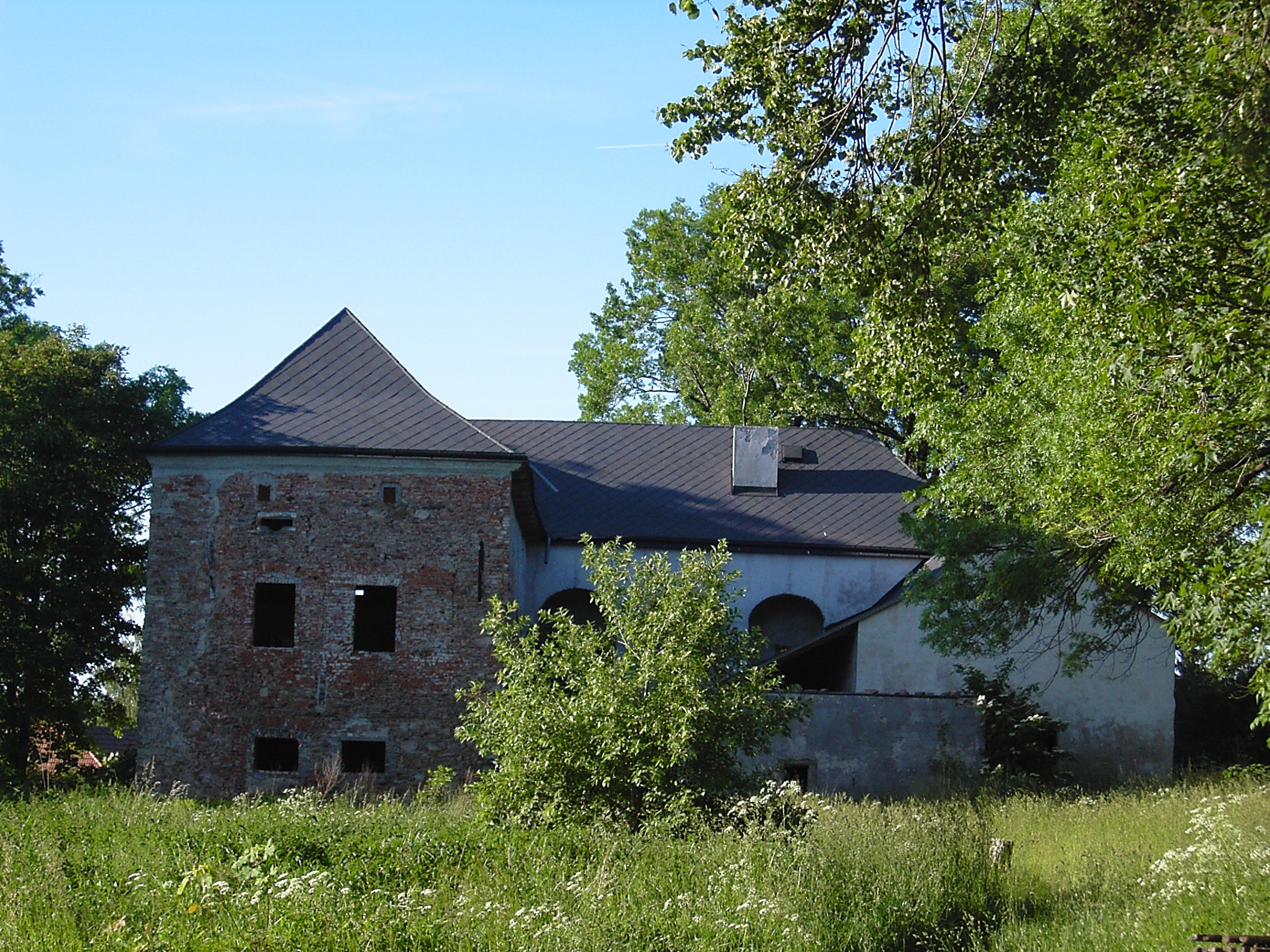 Tvrz v obci Lipka u Horního Bradla